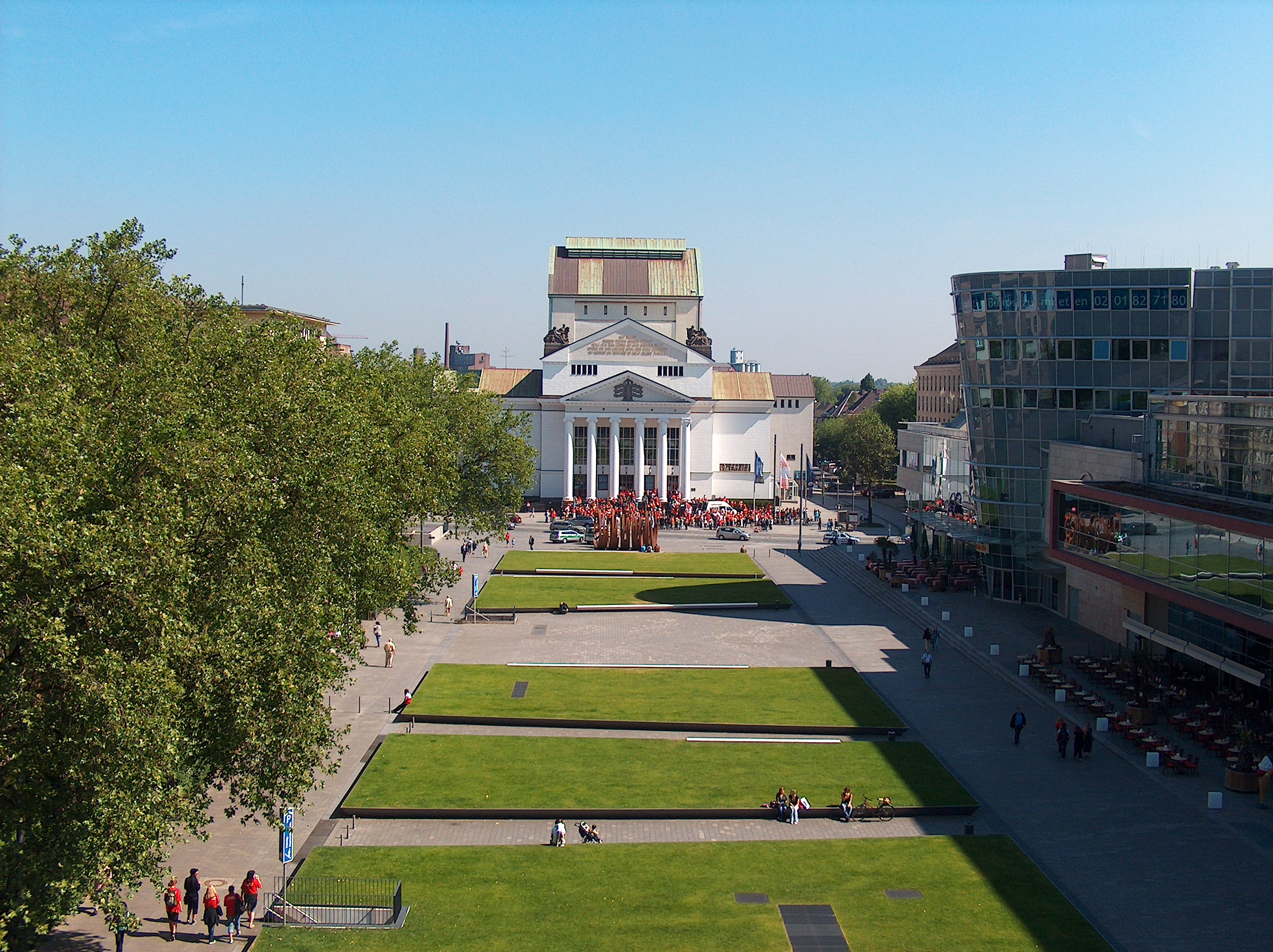 Theater Duisburg vom Forum aus fotografiert. Vor dem Theater stattfindender Streik der Verdi.